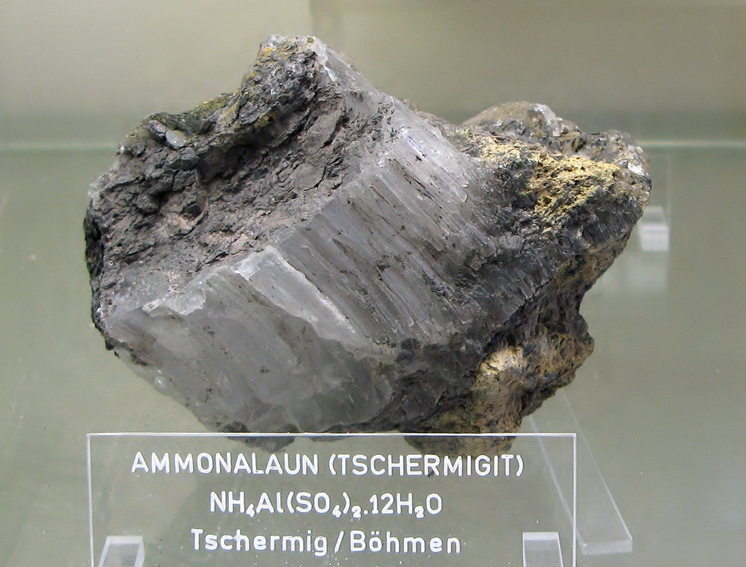 Tschermigit (Ammonalaun) - Fundort: Tschermig, Böhmen - aufgenommen im Mineralogischen Museum der Universität Bonn